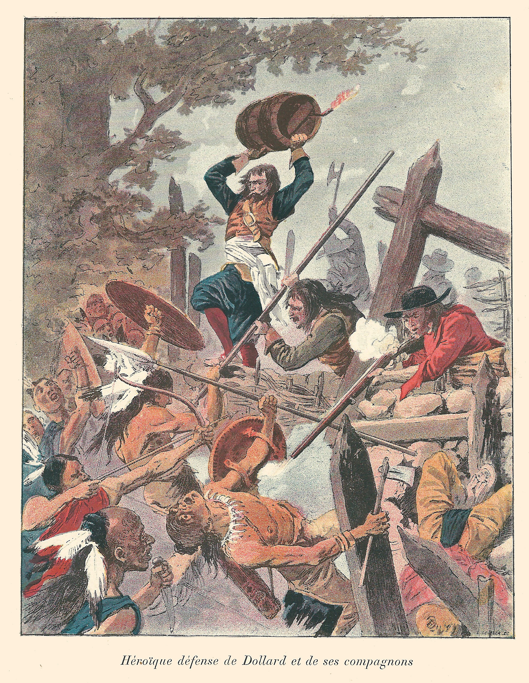 Illustration tiréé de l'Histoire de la Nouvelle France d'Eugène Guénin